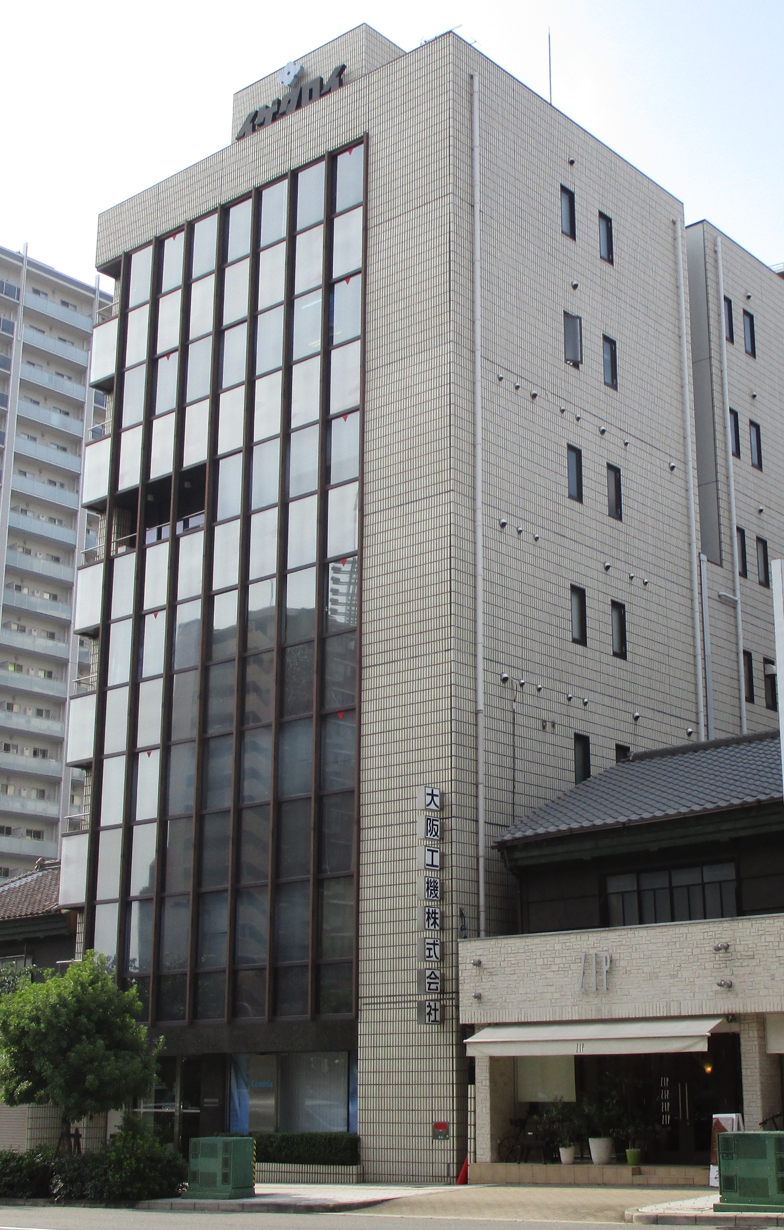 大阪工機本社ビル